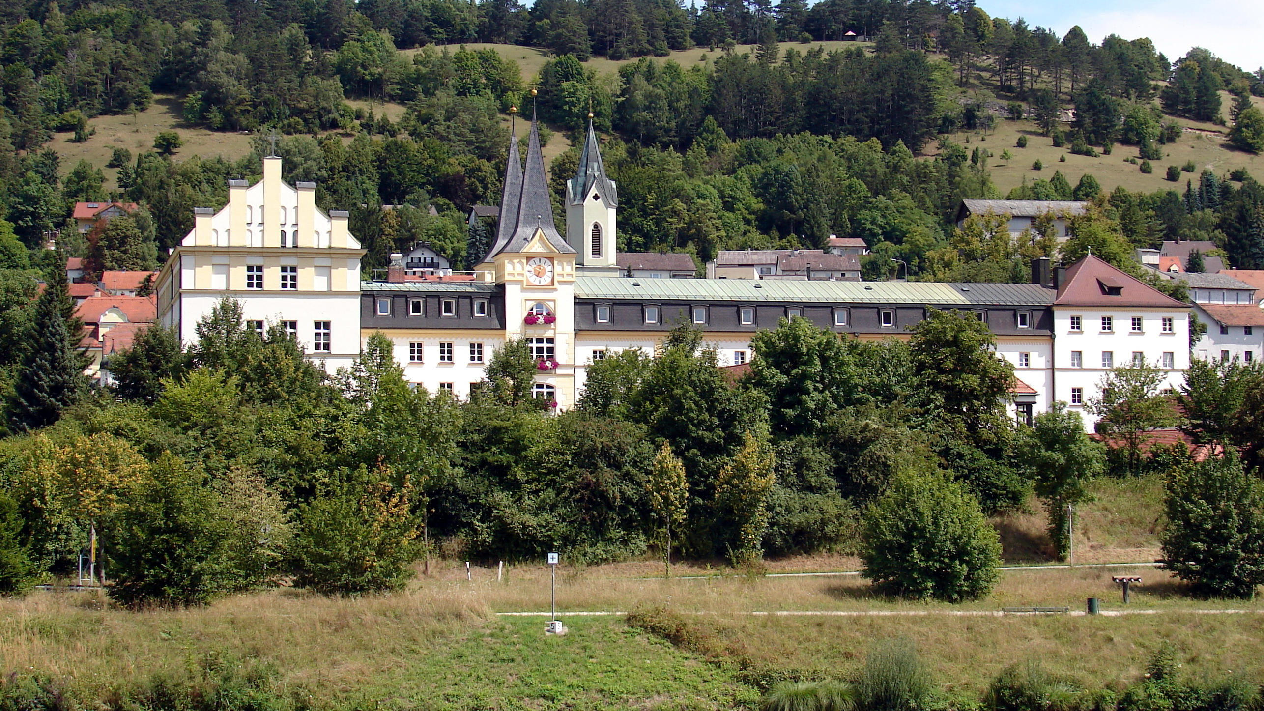 Klarissenkloster St. Anna, Vierflügelanlage, der Quertrakt mit Treppengiebeln, zwei Türme, erbaut in gotisierenden Formen 1858/59